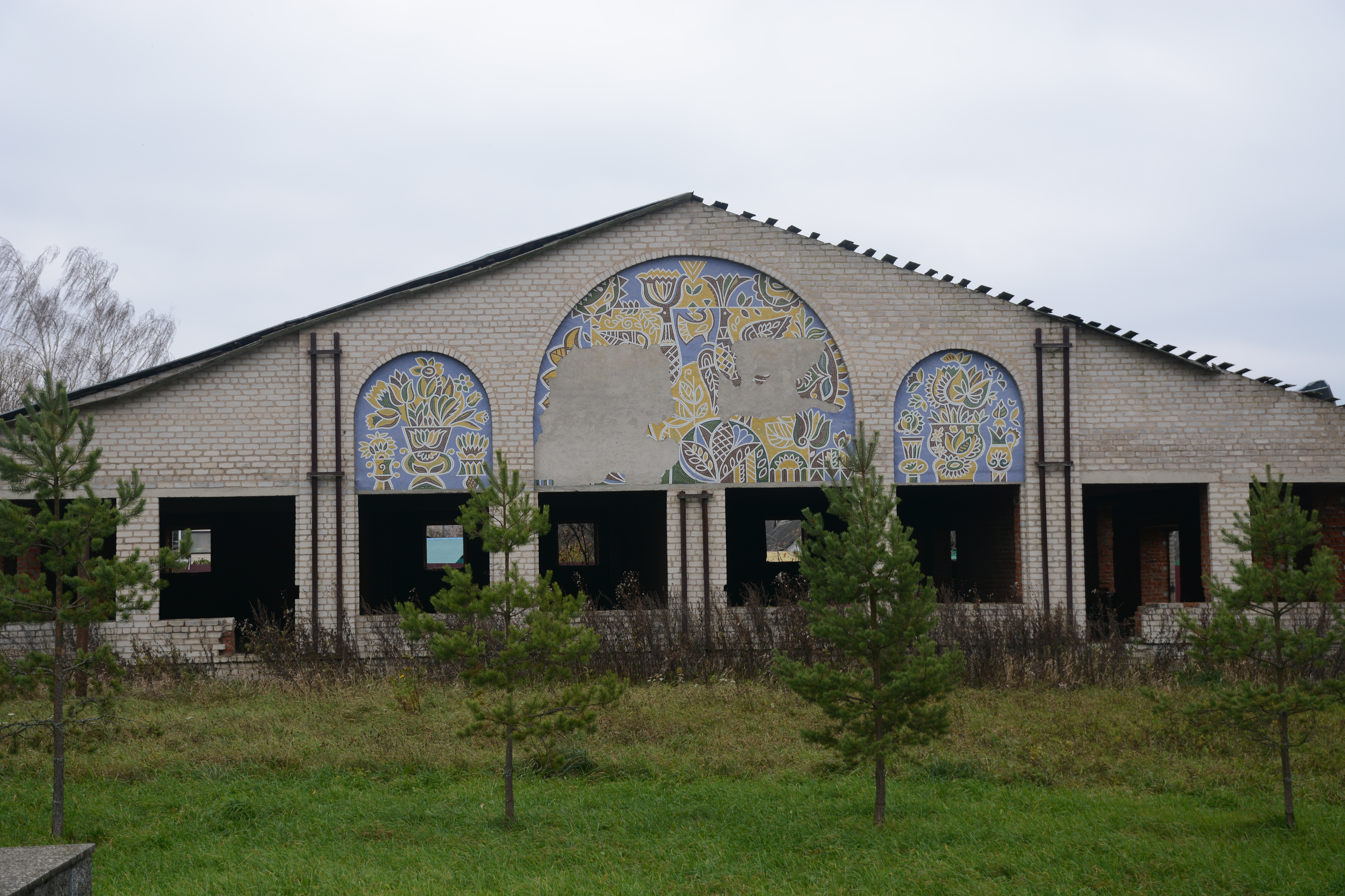 Смоленская обл., Новодугинский р-н, дер. Ивановское. Заброшенный Дом культуры.